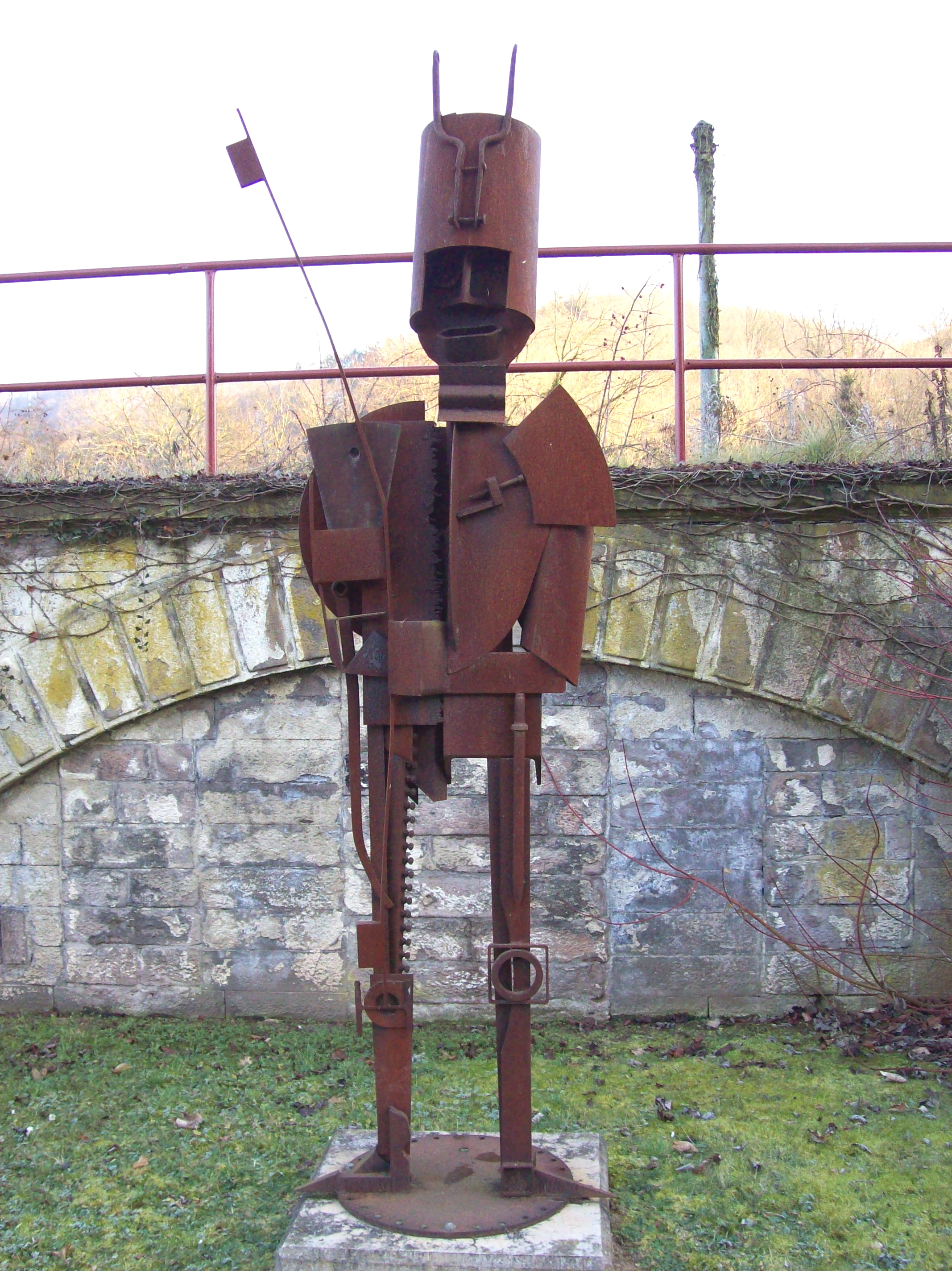 Plastik von Wilfrid Polke. Standort: Ebernburg